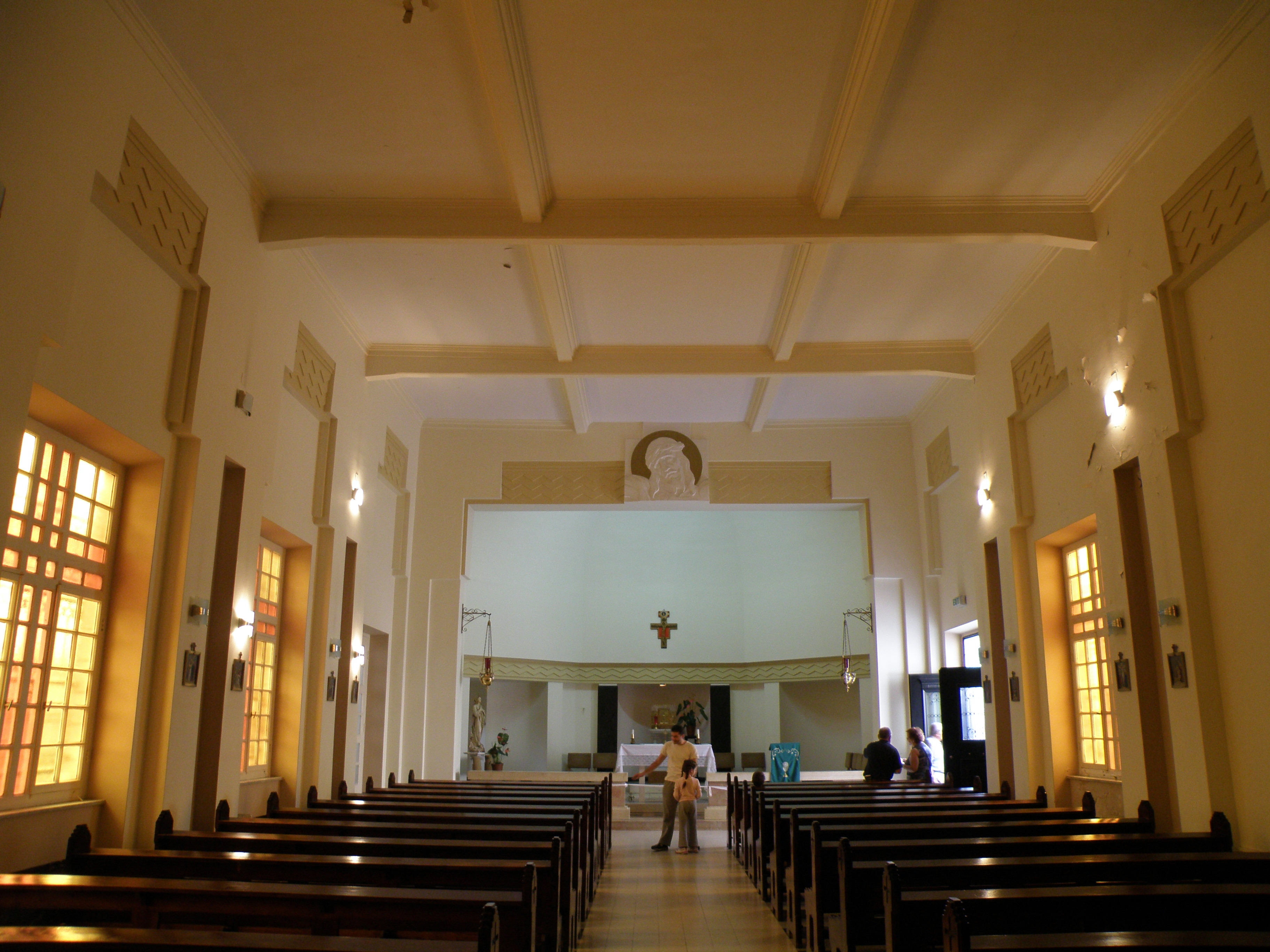 בתים מבפנים 2010